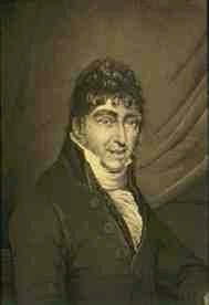 Dutch writer Willem Bilderdijk